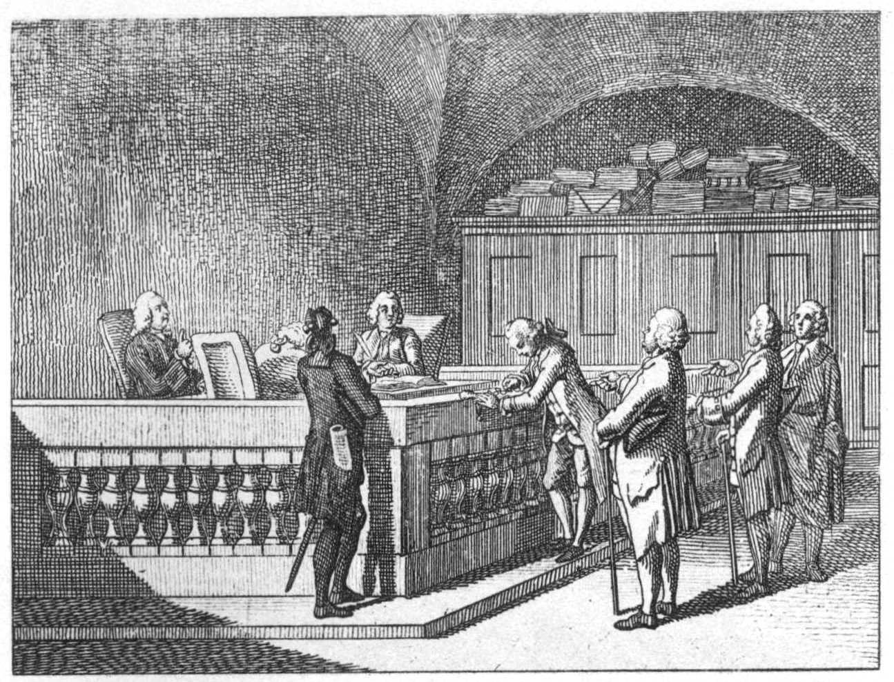 Tab. XXXIV. Vorstellung einiger öffentlichen Strafen. a) Die Geldstrafe vor Gericht. (Beschreibung lt. Quelle)